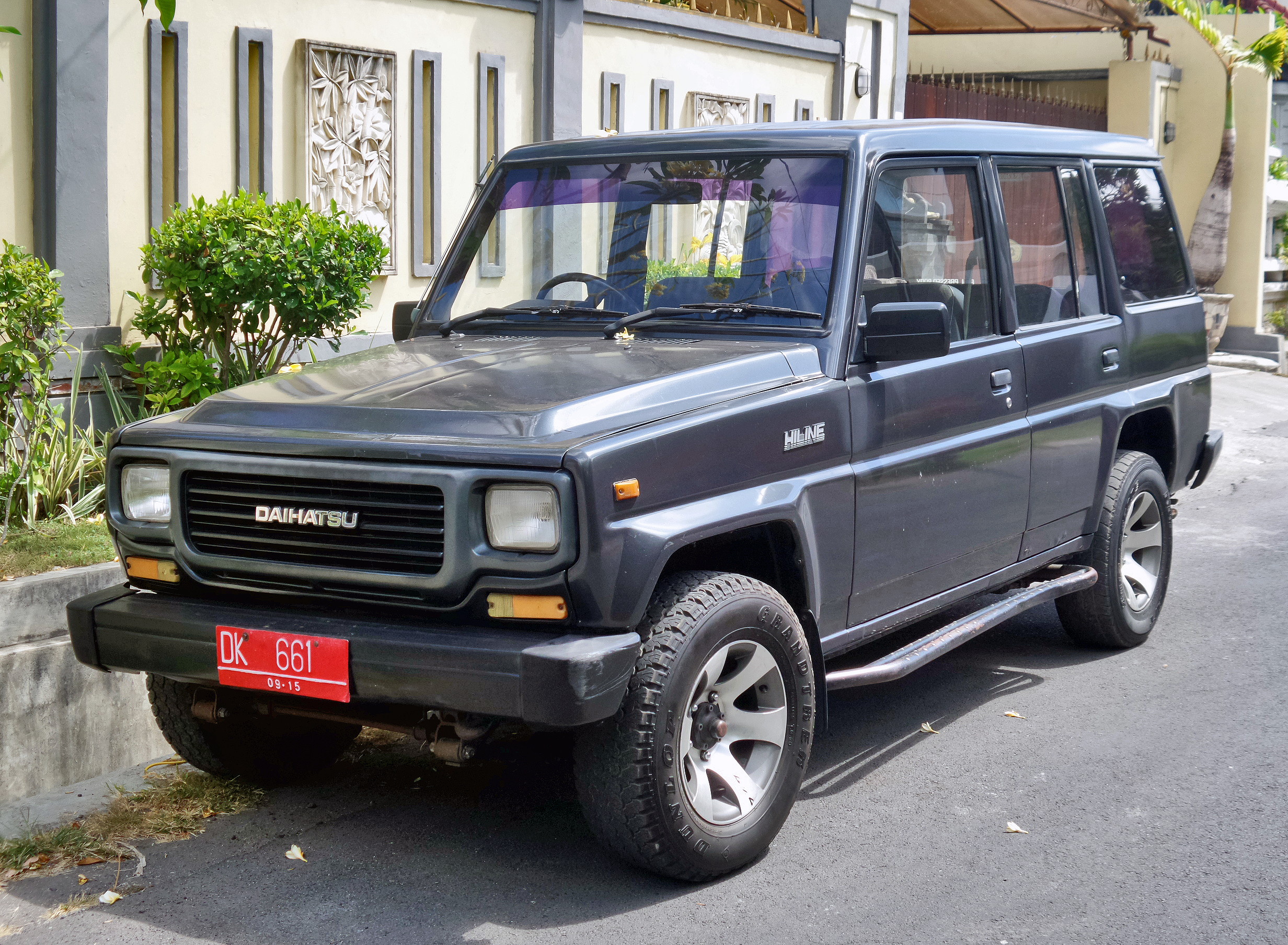 Sisi depan Daihatsu Hi-Line 5 pintu (seri F70) di Renon, Kota Denpasar, Bali.